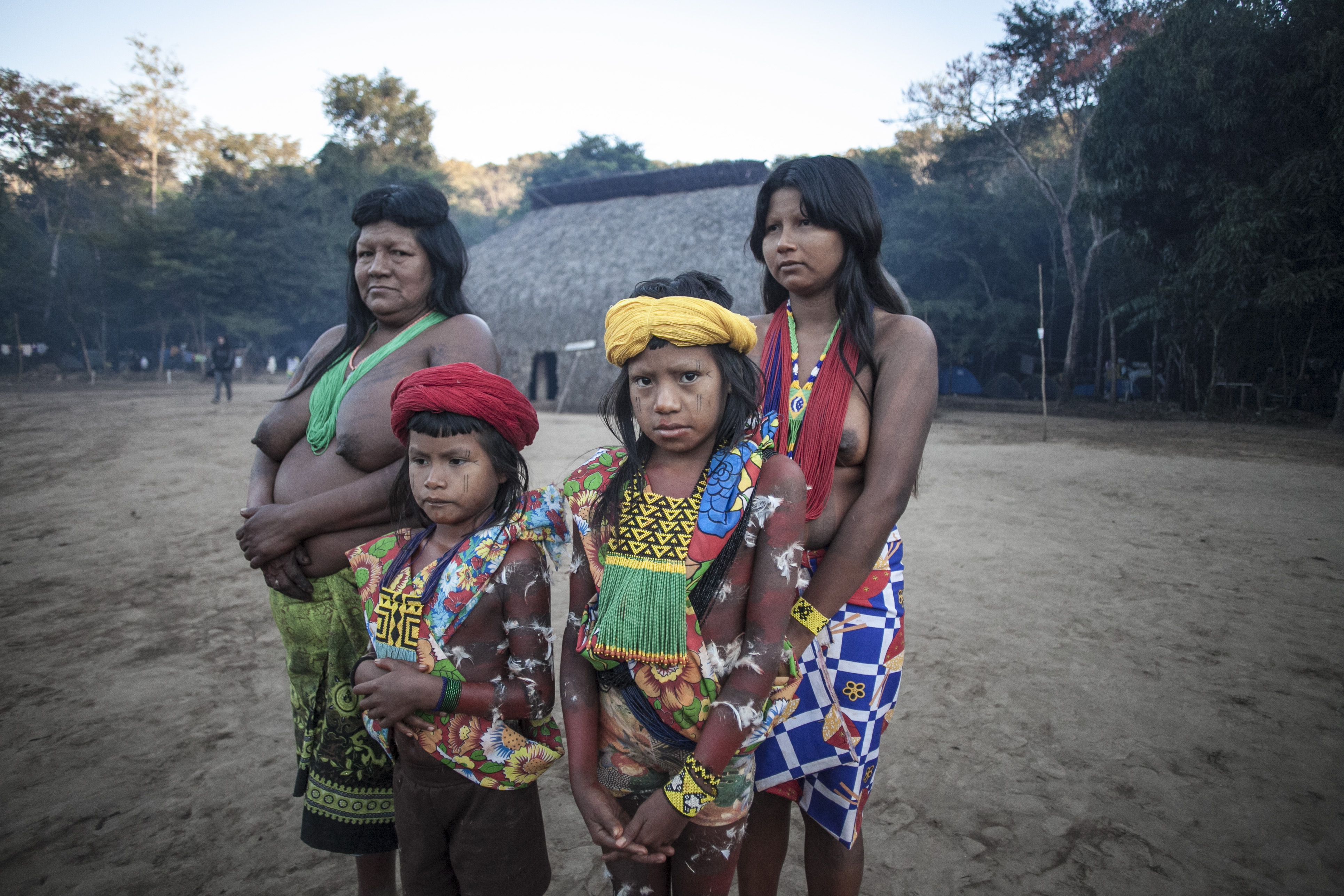 "A VI Aldeia Multiétnica aconteceu do dia 20 ão 26 de julho. Nove etnias participaram: Kayapó, Krahô, Yawalapiti, Kaxinawá, Yawanawá, Xavante, Dessana, Guarani e Kuntanawá. Desde 2007, o evento faz parte da programação do Encontro de Culturas. Espaço de integração cultural, a Aldeia desenvolve atividades que visam promover a interação dos grupos indígenas entre si e com o público. Rodas de prosa, oficinas de artesanato e pinturas corporais, exposições fotográficas e exibição de vídeos produzidos pelos próprios indígenas ganharam seu espaço cativo."